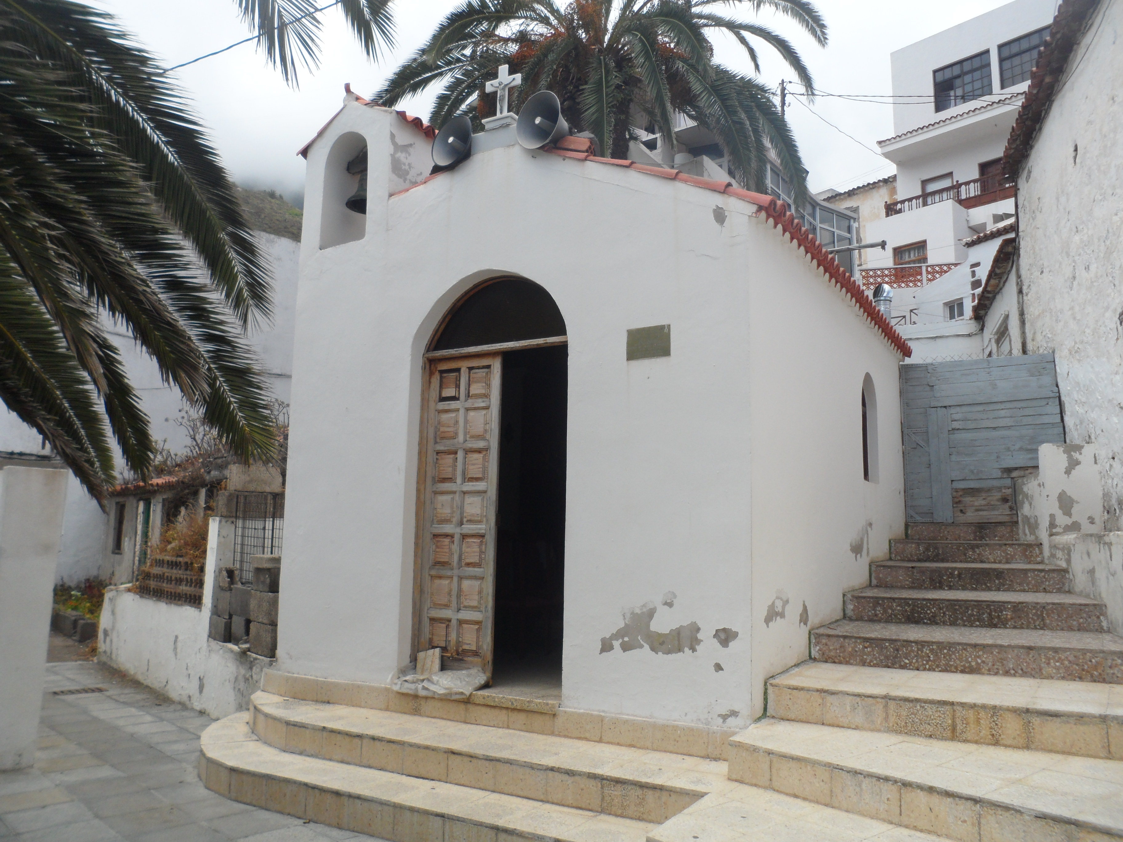 Ermita de Ntra. Señora de La Caridad Del Cobre. Caserío de Azanos en Taganana.